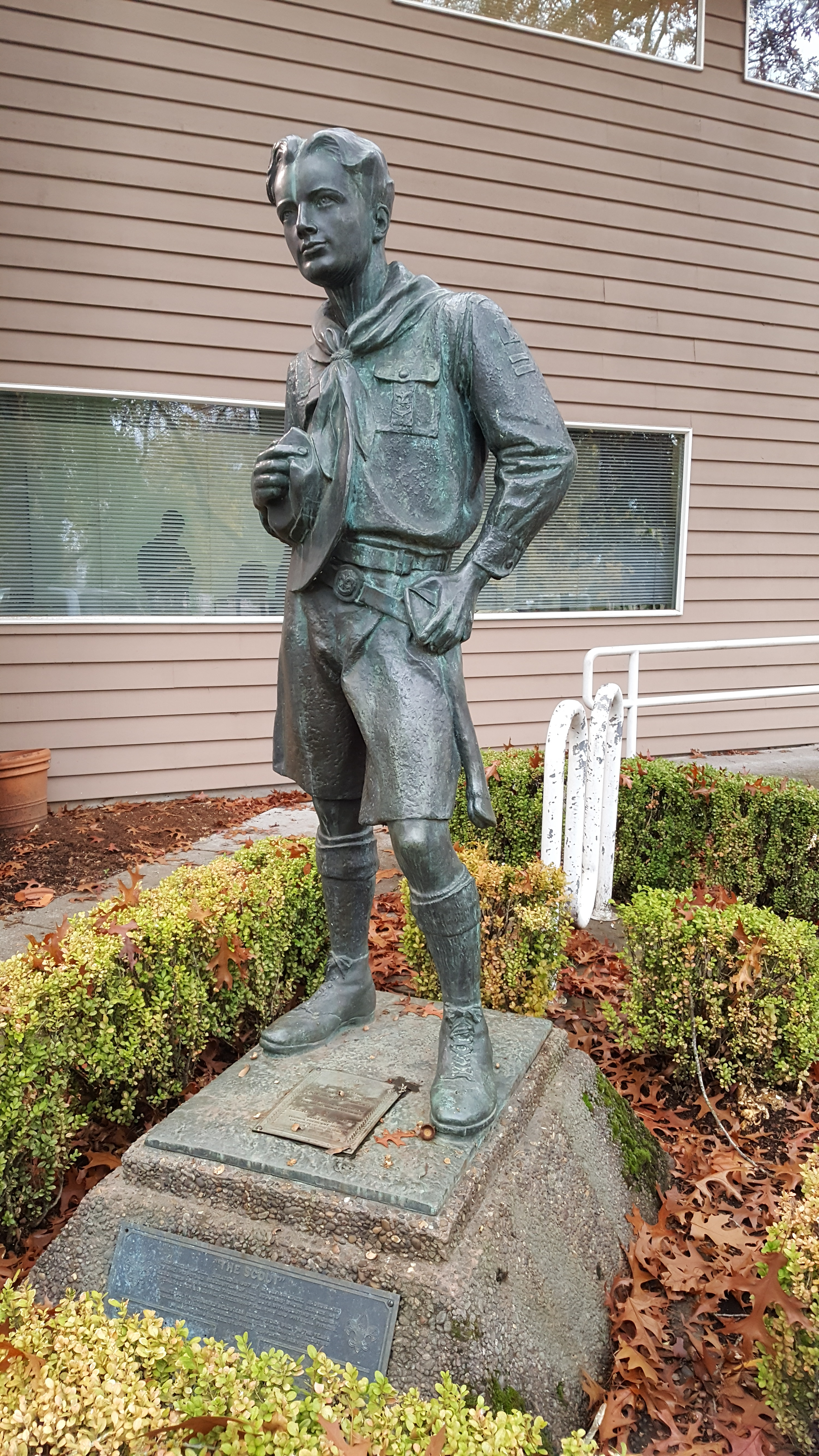 BSA